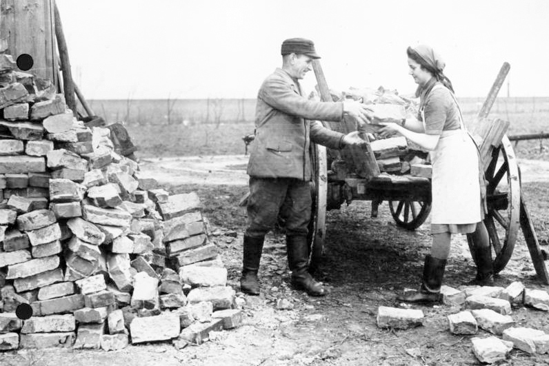 RAD Maiden im Warthegau. Bild Nr. 2512 Eine Arbeitsmaid aus dem Lager Schmückert ist bei einem Bauern im Einsatz. Sie hilft hier beim Abladen von Ziegeln.